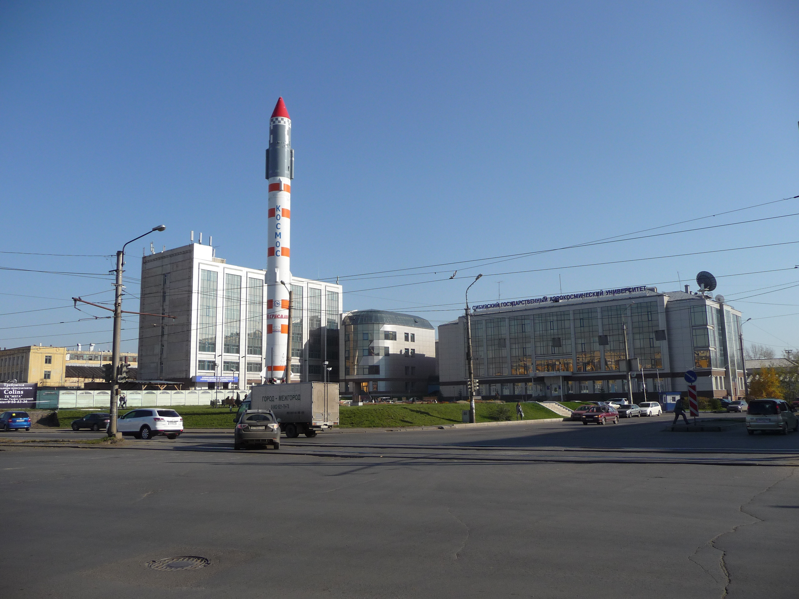 Сибирский государственный аэрокосмический университет, Красноярск